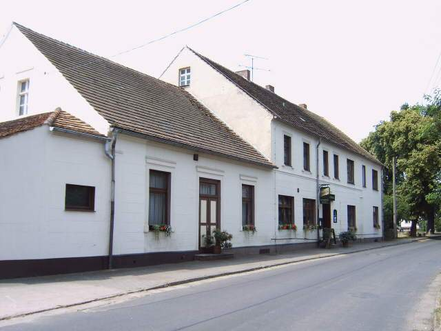 Gasthof Hempel in Alt Zauche, Land Brandenburg, Deutschland Bild aufgenommen von Olaf Meister am 24.6.2006